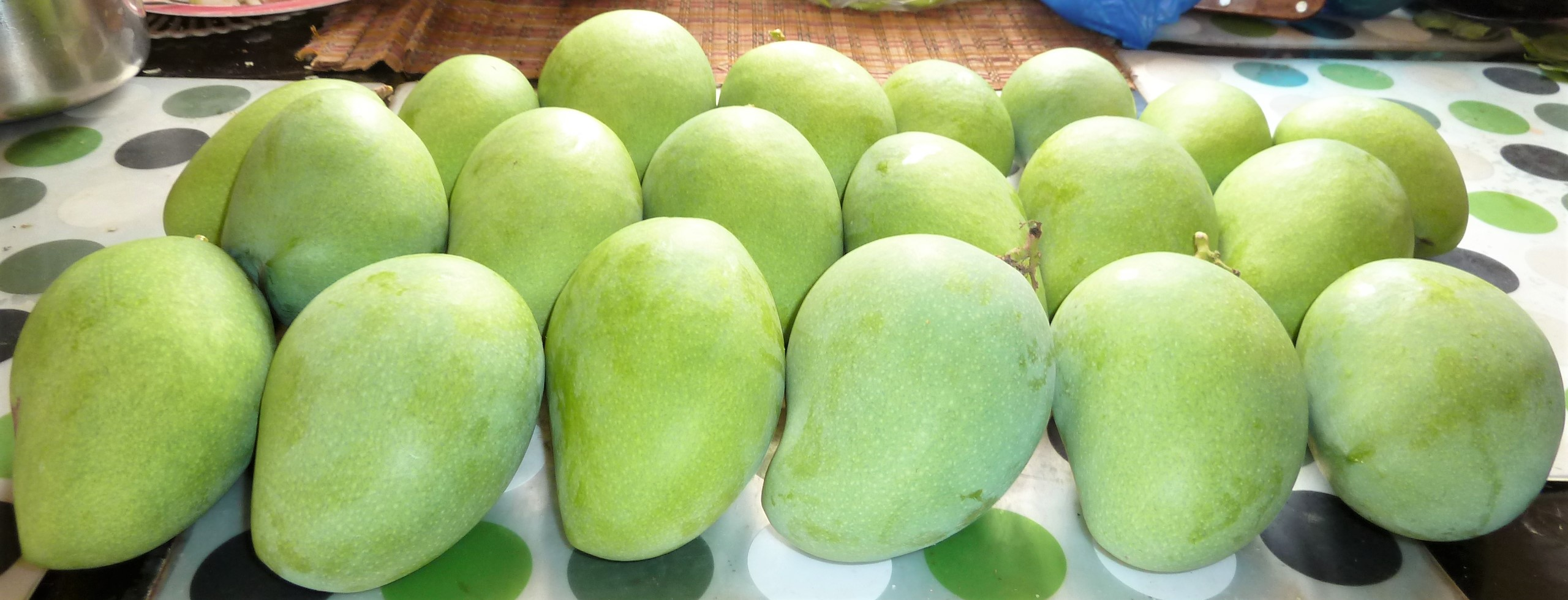 మామిడికాయలు